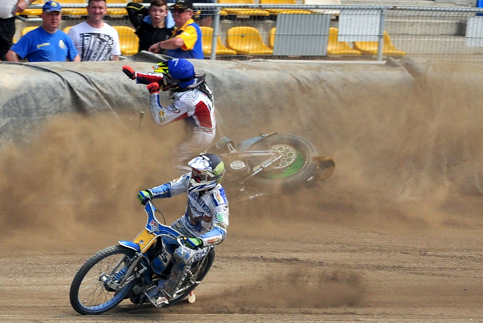 Sport żużlowy. Zawodnik z pełnym impetem uderza w dmuchaną bandę.